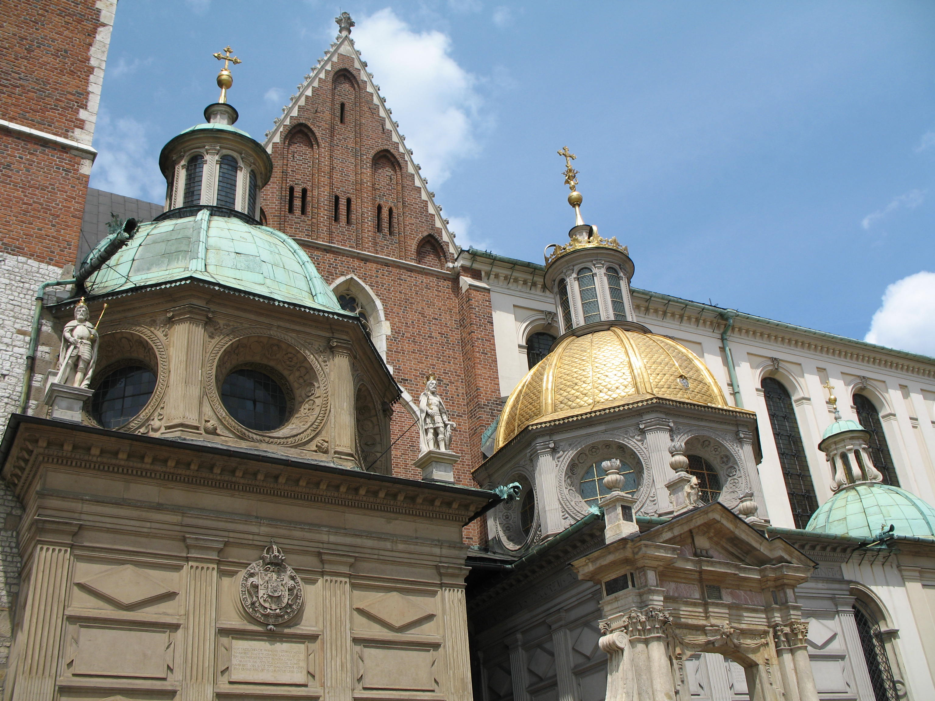 Wawel in Kraków, Poland